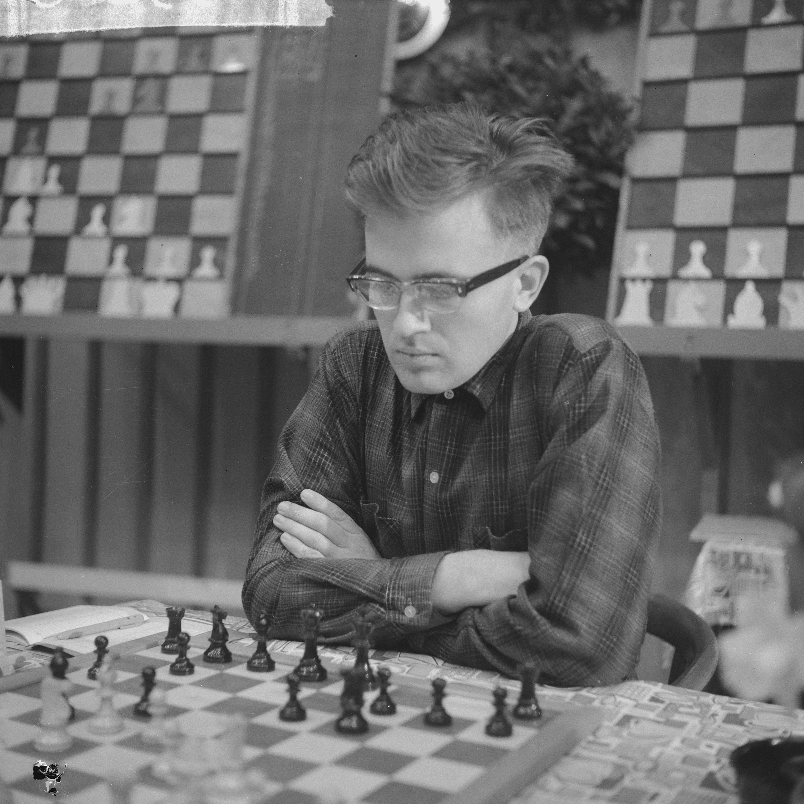 Collectie / Archief : Fotocollectie Anefo Reportage / Serie : [ onbekend ] Beschrijving : 26e Hoogovenschaaktoernooi te Beverwijk, B. Larsen (Denemarken) Datum : 8 januari 1964 Locatie : Beverwijk, Denemarken Trefwoorden : schaken Persoonsnaam : B. Larsen Instellingsnaam : Hoogovenschaaktournooi Fotograaf : Nijs, Jac. de / Anefo Auteursrechthebbende : Nationaal Archief Materiaalsoort : Negatief (zwart/wit) Nummer archiefinventaris : bekijk toegang 2.24.01.03 Bestanddeelnummer : 915-9228